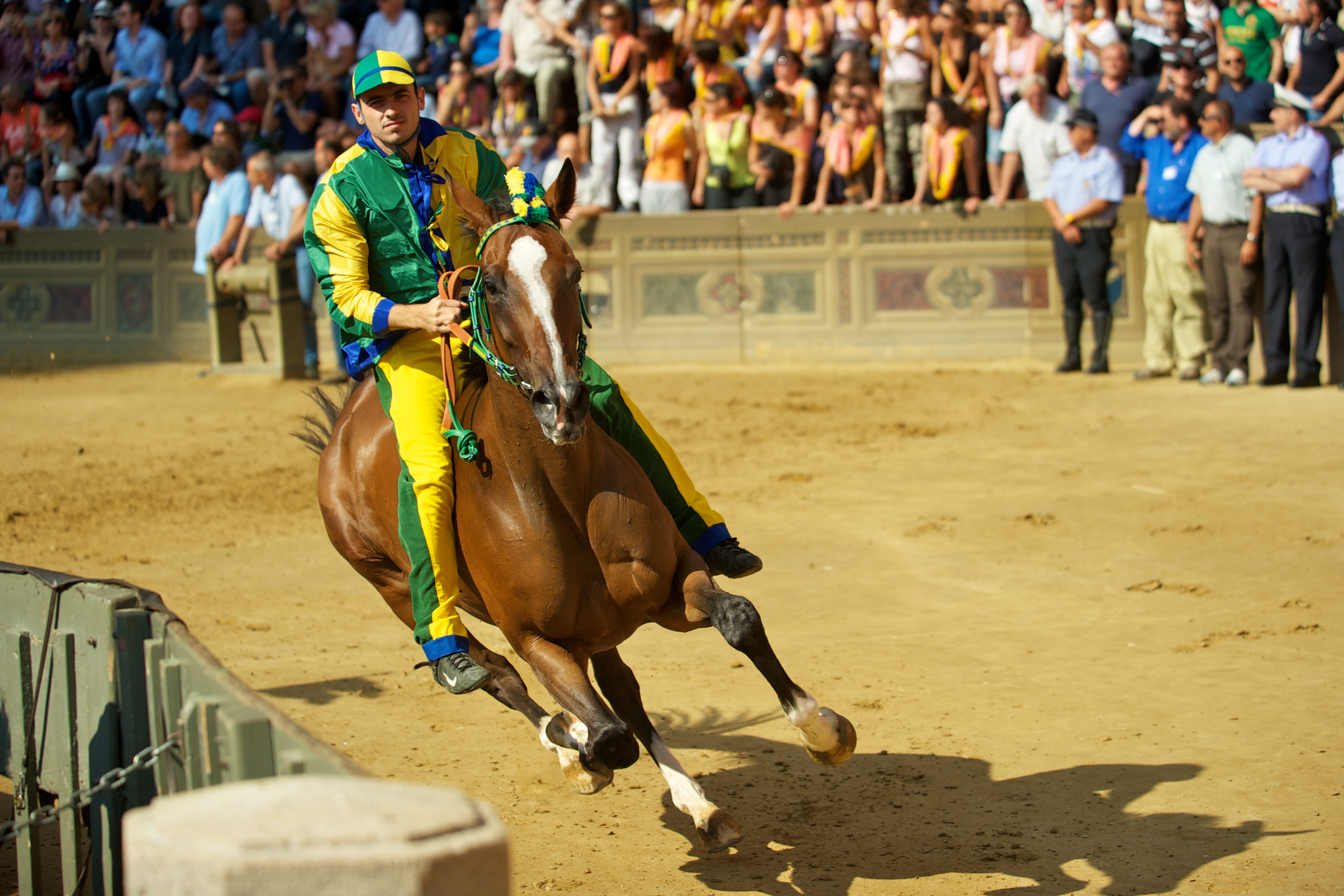 Bruco con Lampante montato da Giuseppe Zedde detto Gingillo.